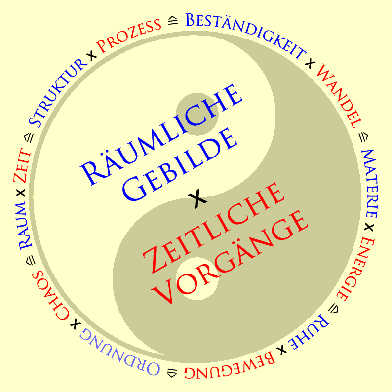 Leitkategorien der menschlichen Kognition im Verhältnis zum obersten ontologischen Komplemäntärbegriff „Gebilde / Vorgänge""